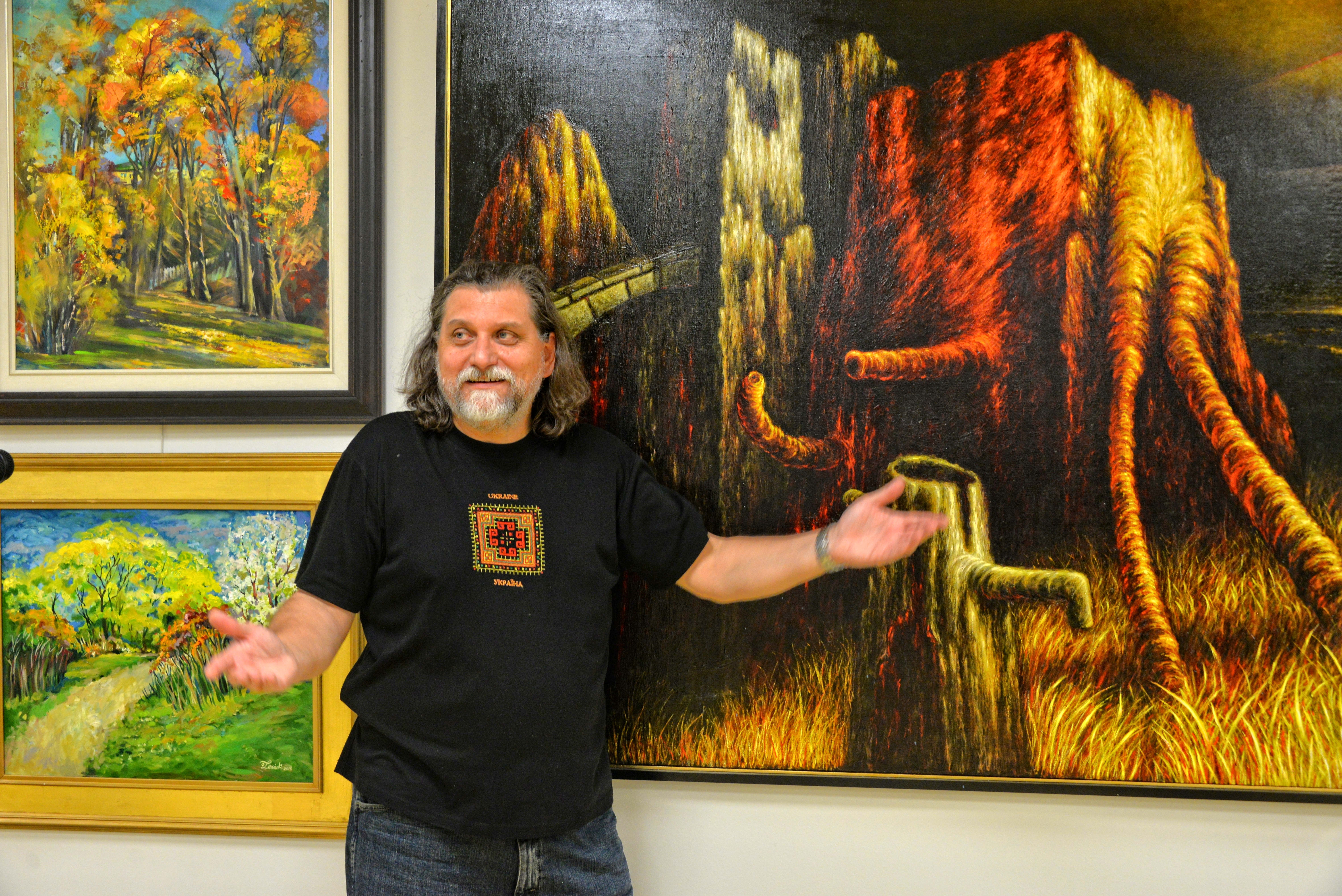 Українсько-канадський скульптор і живописець Олег Лесюк на виставці в галереї КУМФ у Торонто